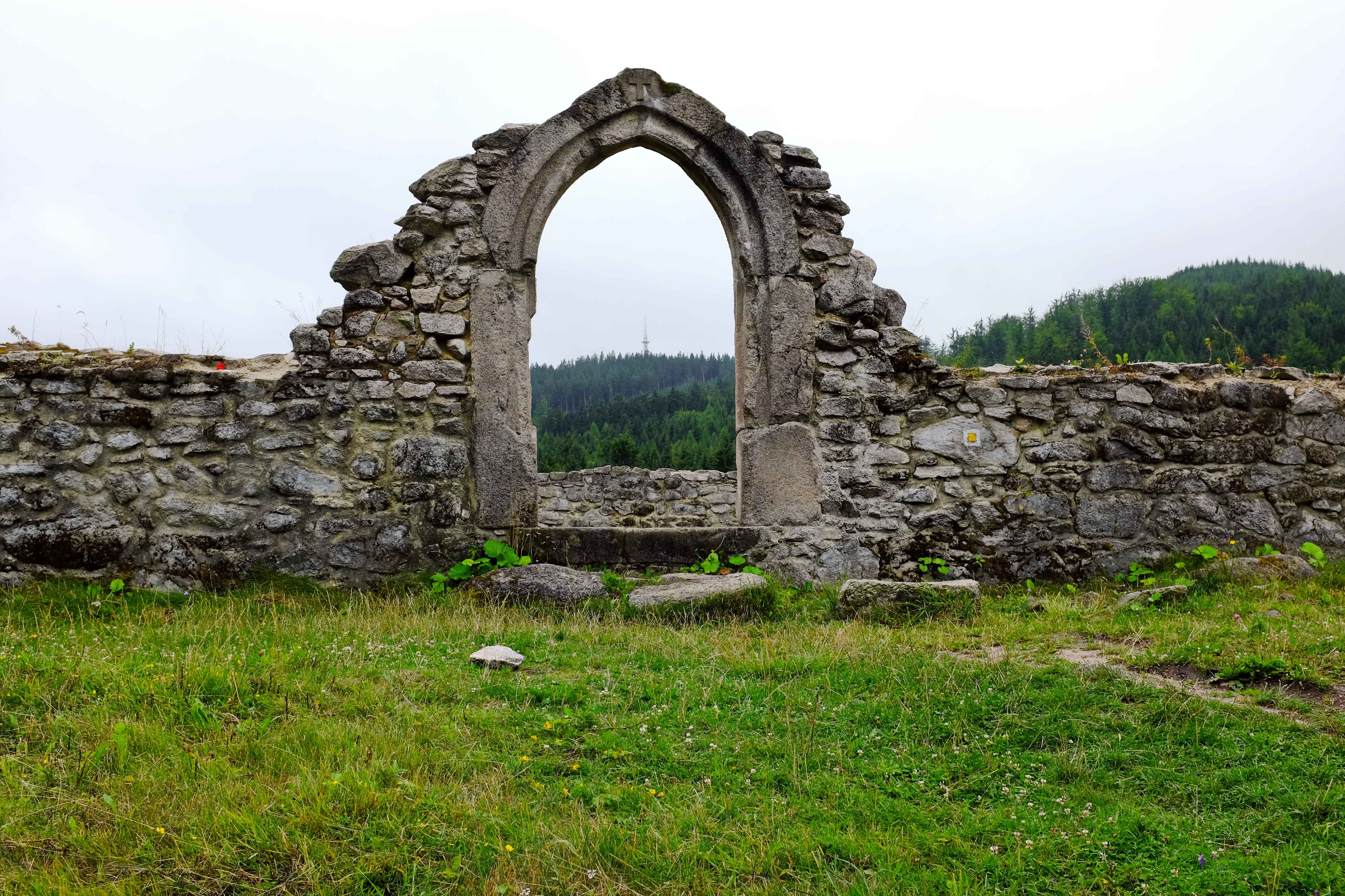 Hrušková, ruina kostela sv. Mikuláše, okres Sokolov